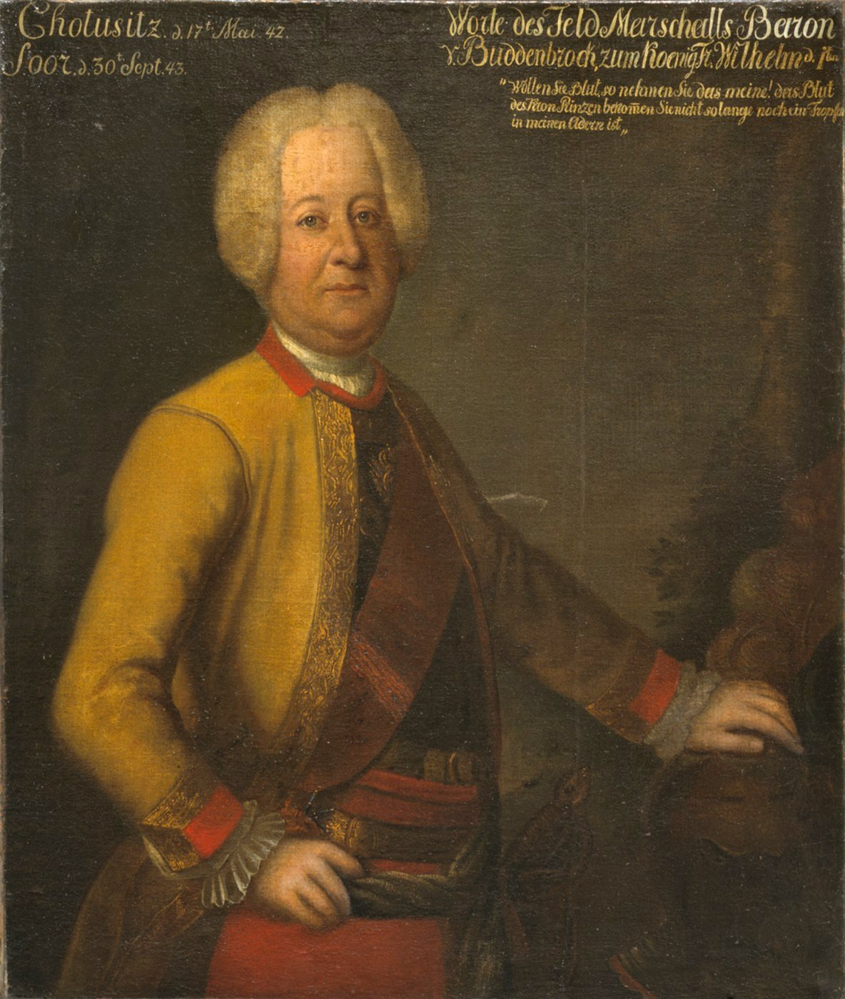 Wilhelm Dietrich von Buddenbrock, preußischer Feldmarschall